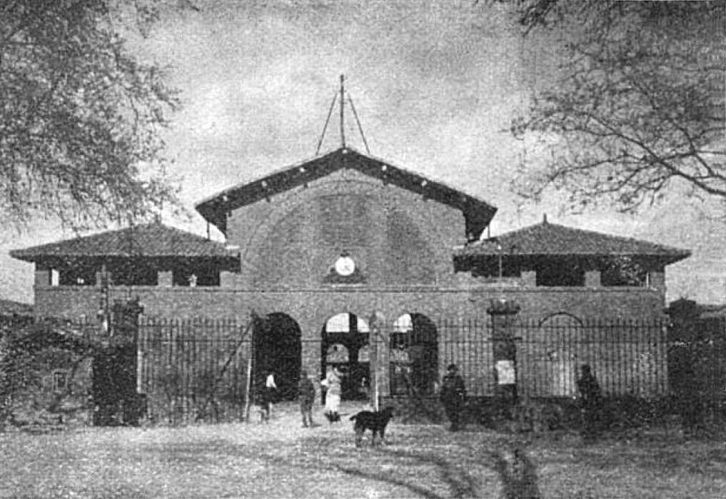 Les abattoirs de Toulouse avant leur transformation de 1929 (inauguration des nouveaux bâtiments le 19 mars).